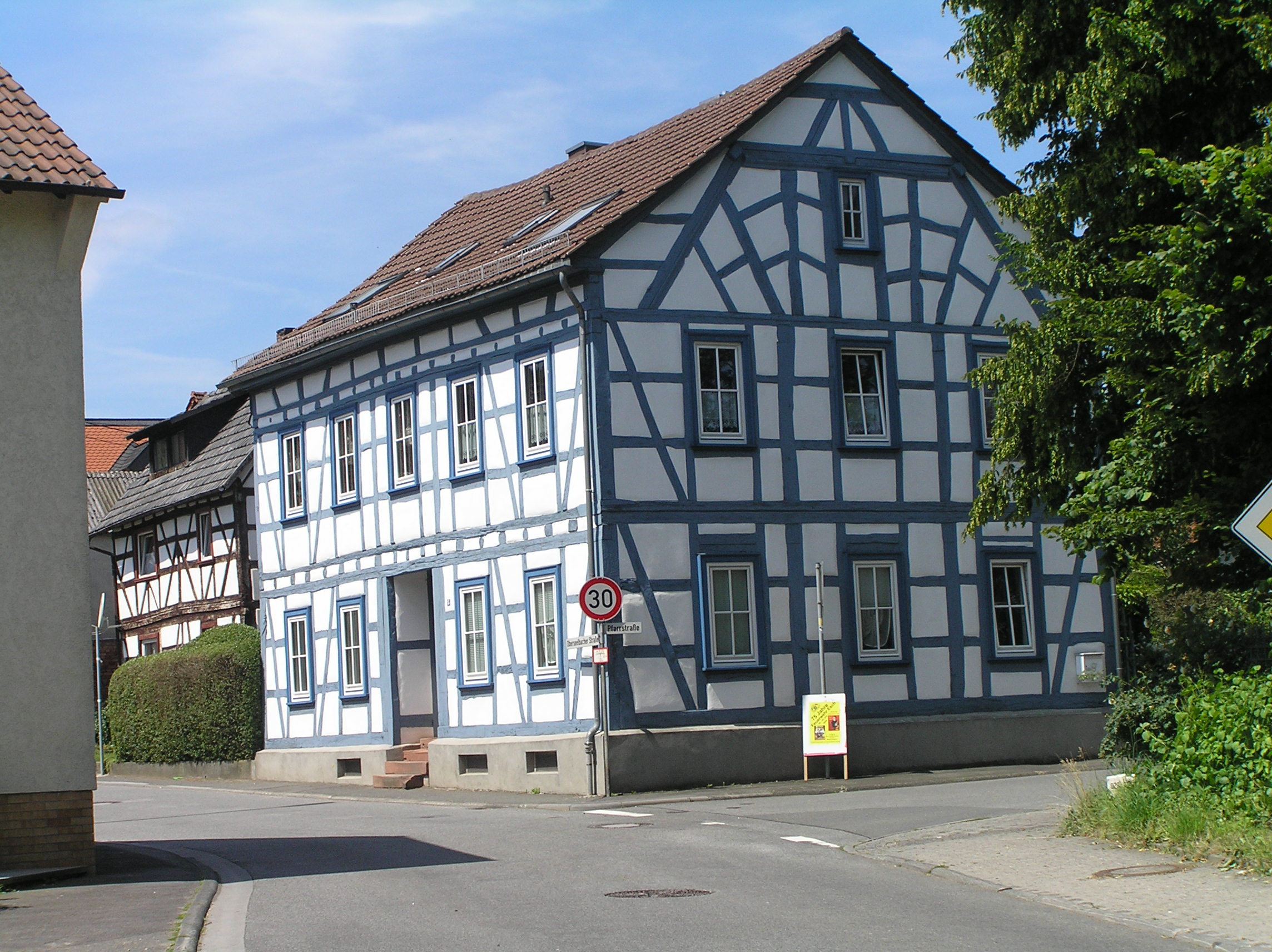 Fachwerkhäuser (Oberseelbacher Straße 15) in der Orsteinfahrt von Niederseelbach von Oberseelbach her kommend gegenüber der Kirche